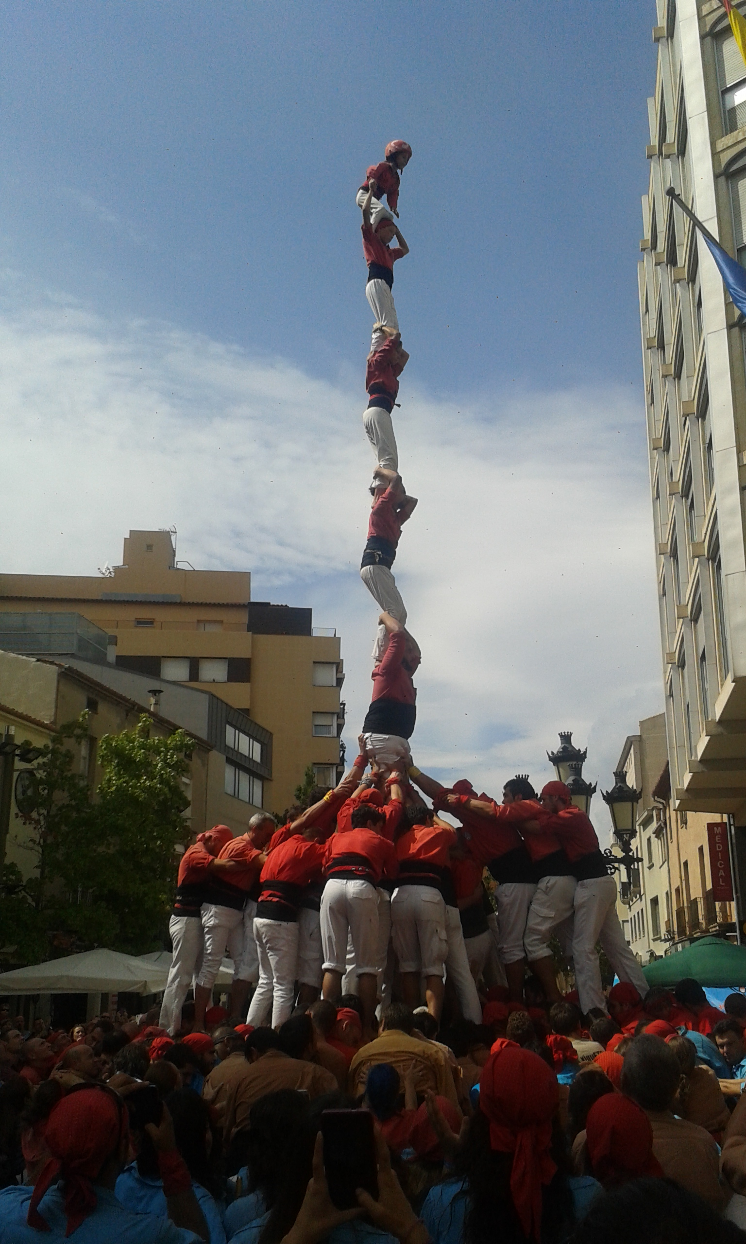 Pilar de 7f descarregat pels Nens a Terrasa, 46 anys després del darrer